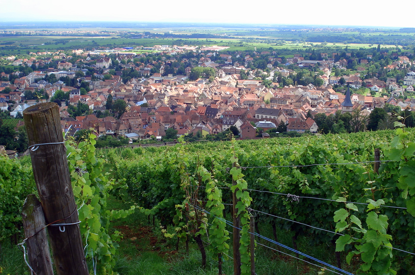 Barr, Alsace, France, vue générale